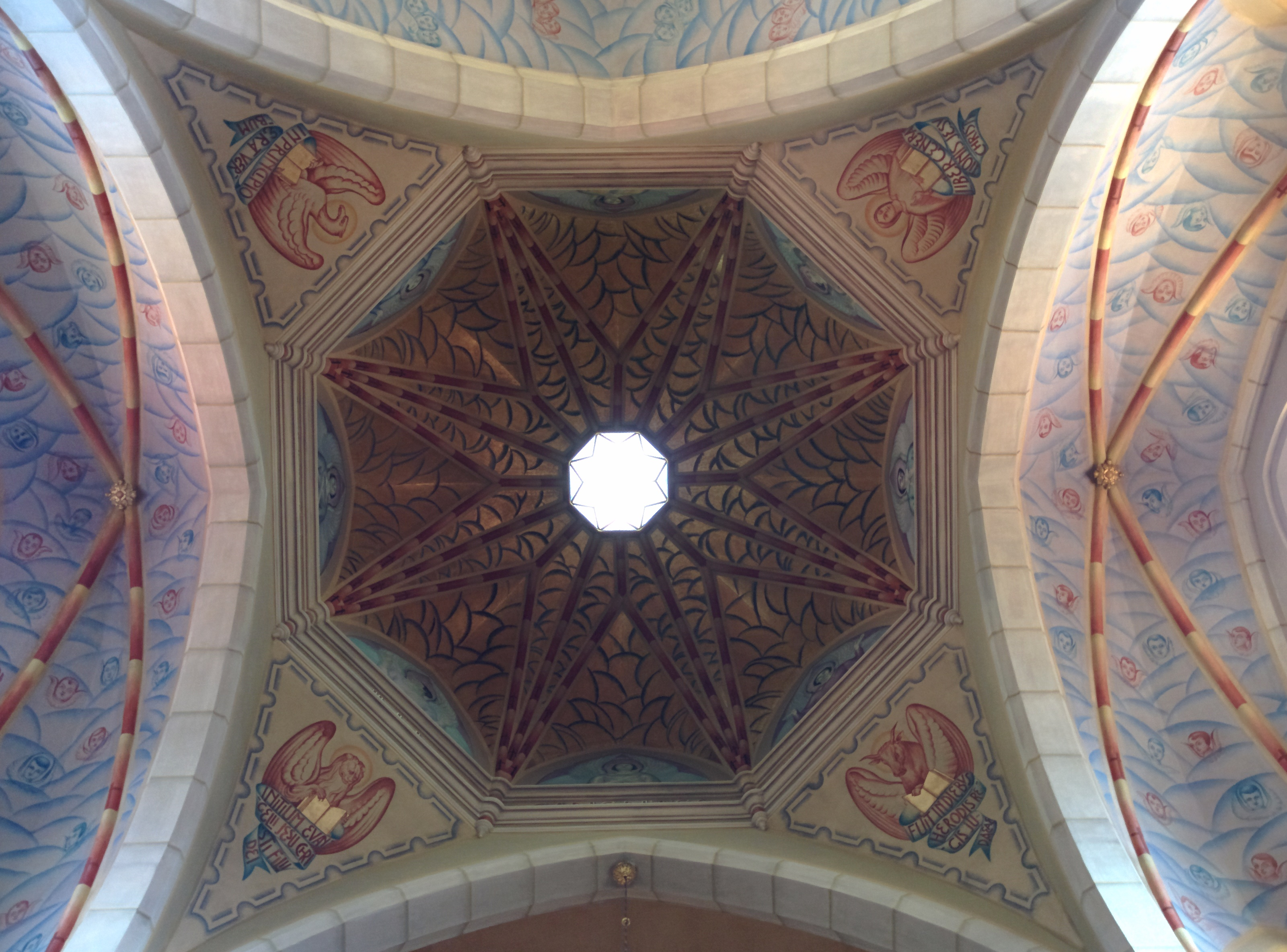 Decorazioni della cupola sopra il coro. Dettaglio delle decorazioni nella chiesa parrocchiale di San Vitale a Castelnovo di Isola Vicentina in provincia di Vicenza. Ai quattro vertici si possono riconoscere l'iconografia stilizzata dei quattro evangelisti.